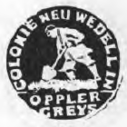 Altes Siegel des Ortes Neuwedel im Kreis Oppeln, Schlesien.